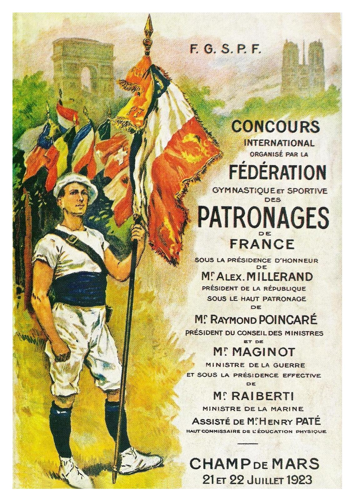 Affiche éditée pour le concours international de gymnastique organisé au Champ-de-mars à Paris les 21 et 22 juillet 1923 par la Fédération gymnastique et sportive des patronages de France (FGSPF), sous la présidence d’honneur d’Alexandre Millerand, président de la République française ; sous le haut patronage de Raymond Poincaré, président du Conseil des ministres et d’André Maginot, ministre de la Guerre ; sous la présidence effective de Flaminius Raiberti, ministre de la Marine, assisté de Henry Paté, haut-commissaire de l’Éducation physique. Cette affiche a été conçue par Alphonse Lalauze (1872–1936), peintre et graveur français, dont l’essentiel de l’œuvre artistique gravite essentiellement autour de thèmes à la fois historiques et militaires. Alphonse Lalauze est le fils d’Adolphe Lalauze (1838–1905), graveur, vignettiste, illustrateur et peintre français.